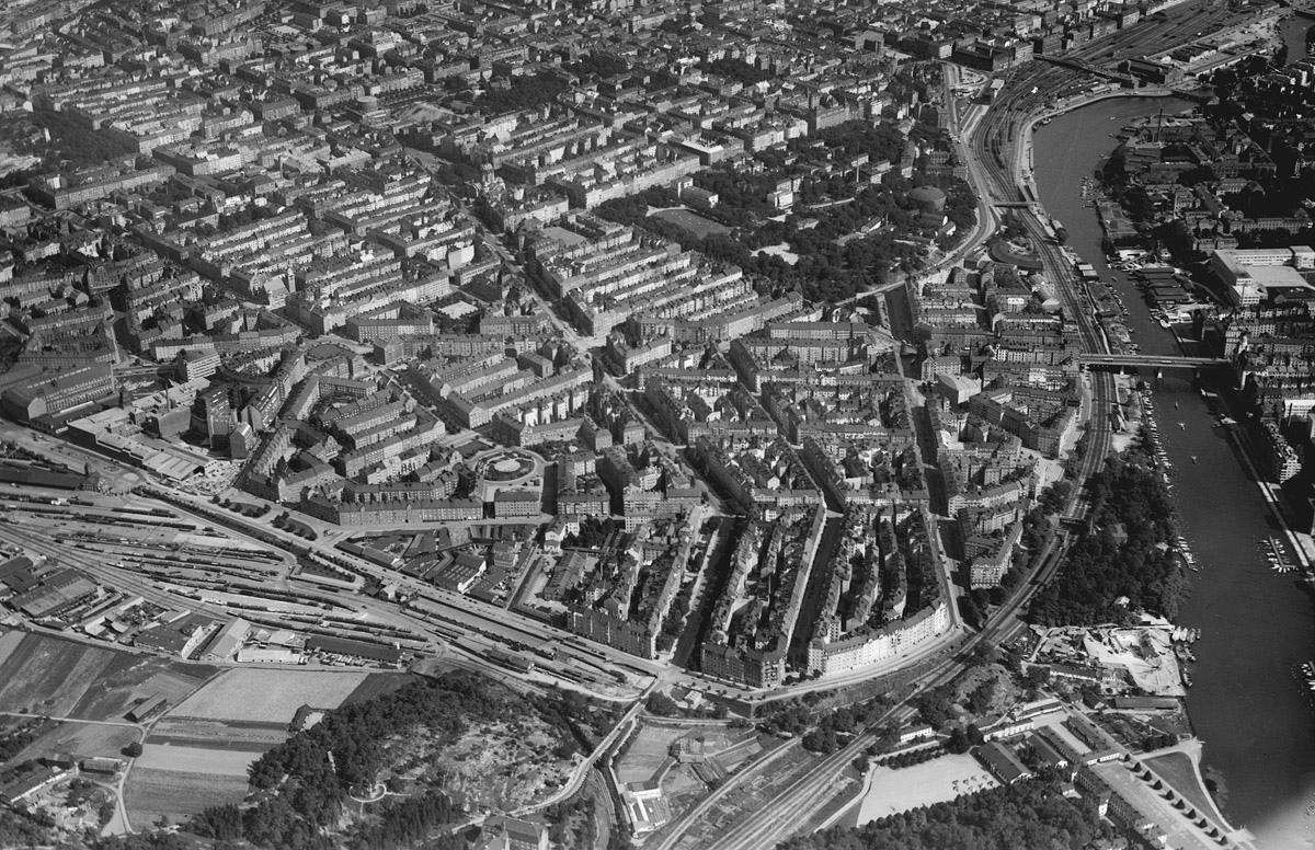 Flygfoto över Vasastaden år 1938 från nordväst